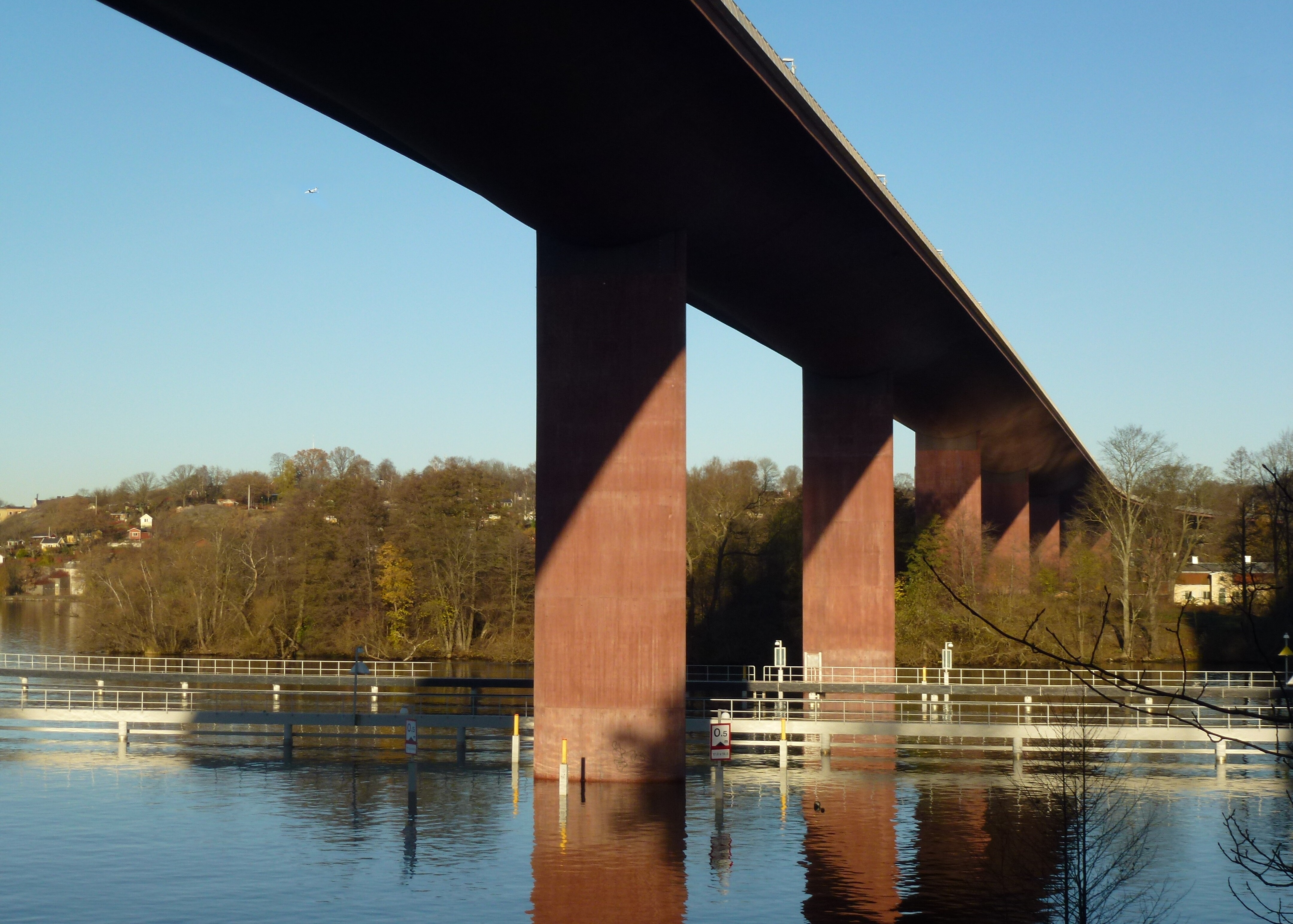 Västra Årstabron, vy från södra sidan